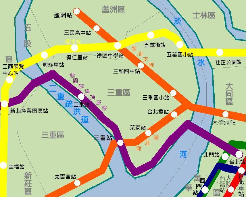 中文（台灣）: 新北市三重地區主要捷運站位置。